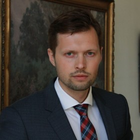 neverauskas.jpg